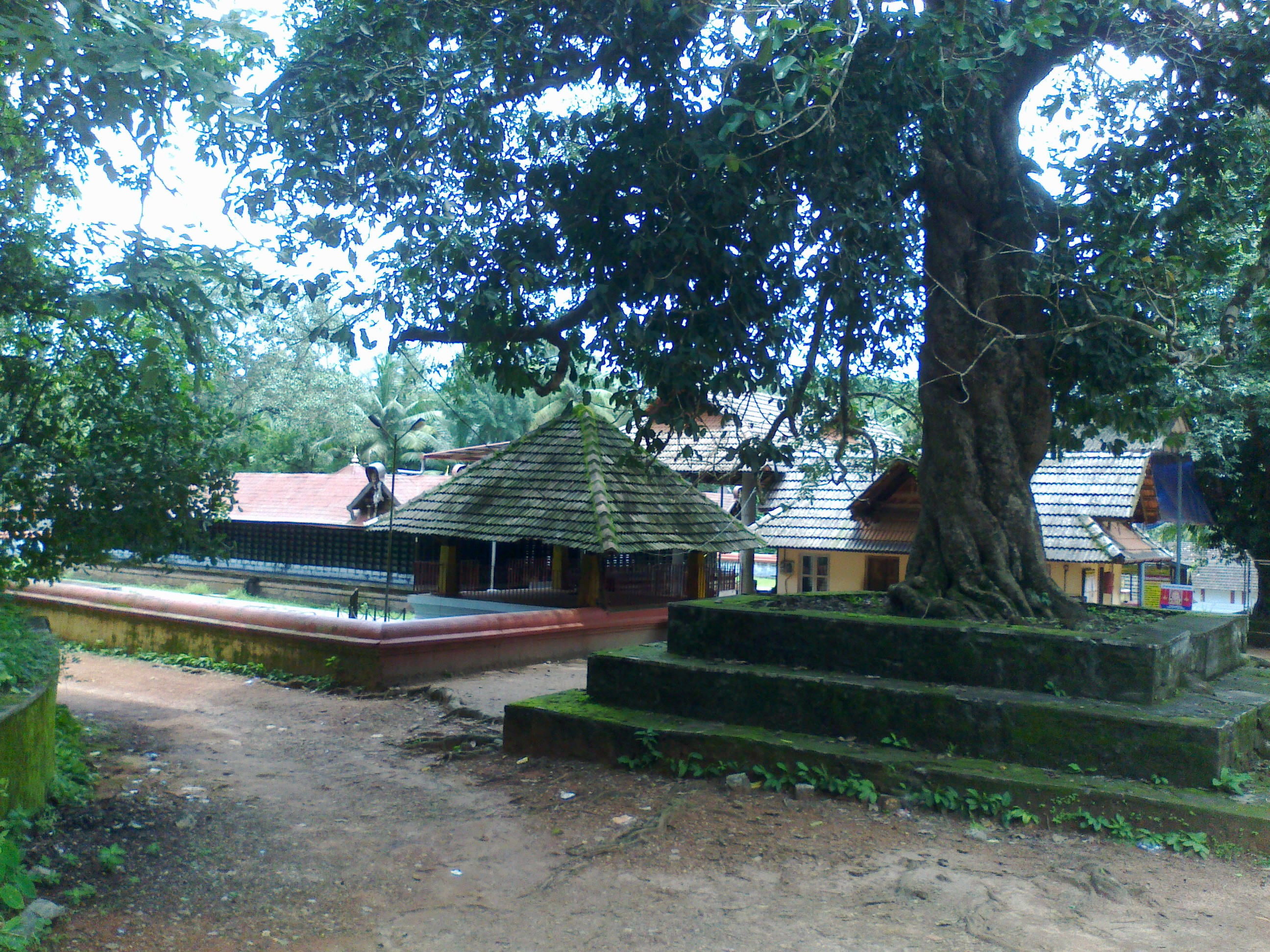 ലോകനാർകാവ് ഭഗവതി ക്ഷേത്രം